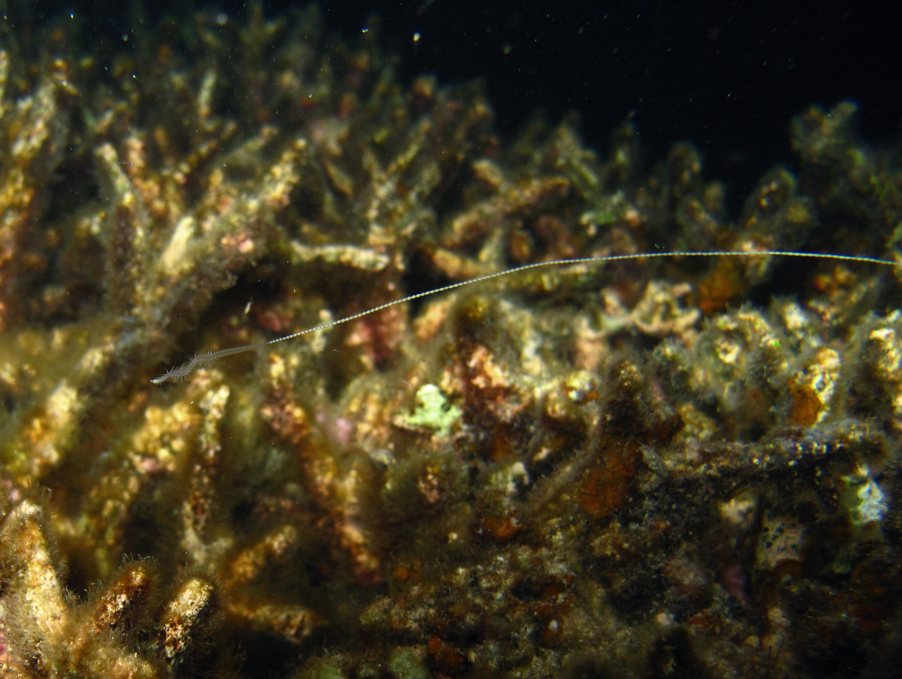 Ver du genre Palola, identification à confirmer (épitoque).